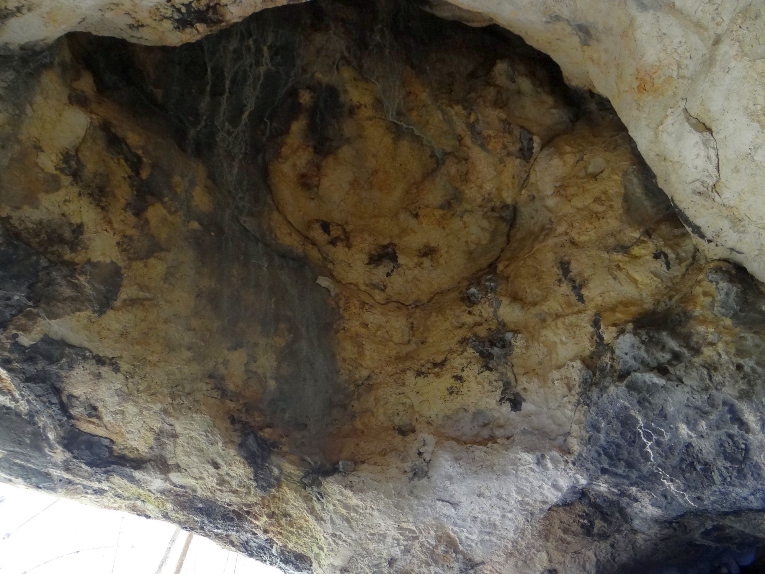 Schronisko Puste